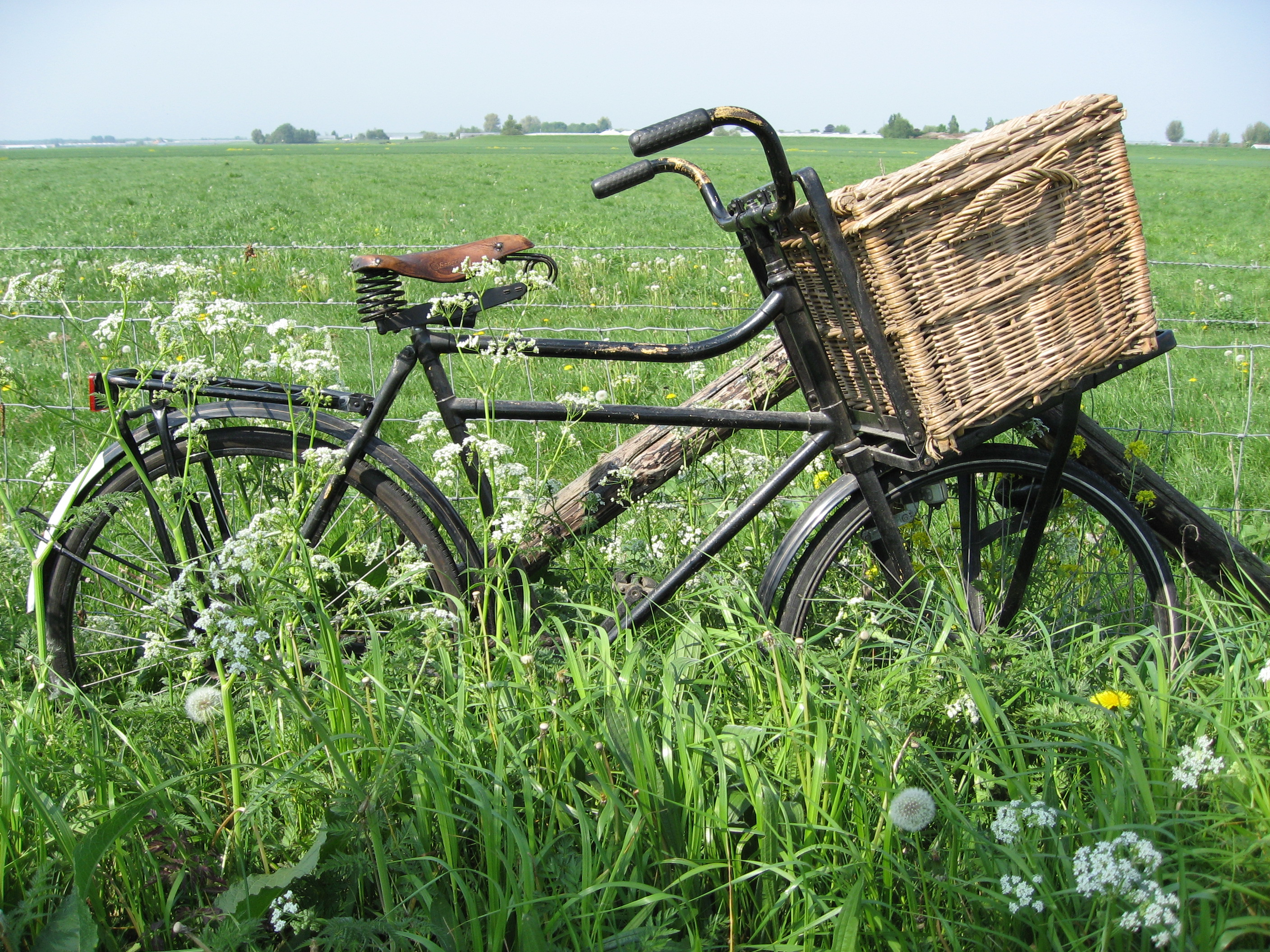 Transportfiets Germaan 1942